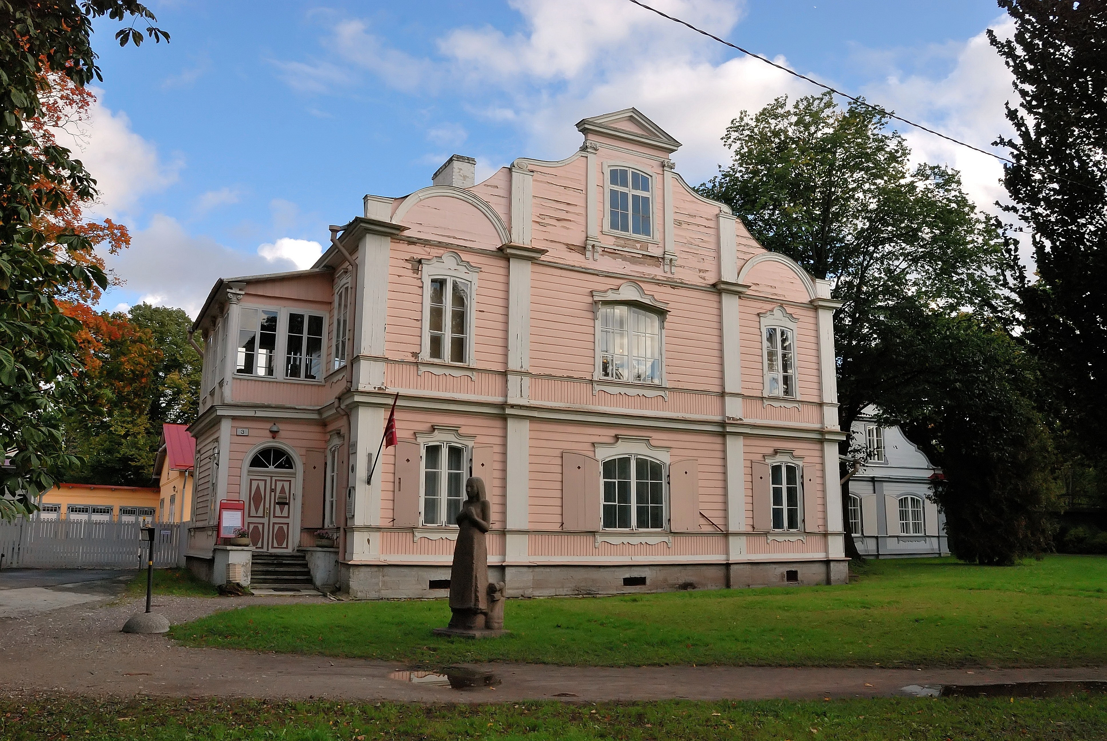 Maja, kus aastail 1927-1933 elas Eduard Vilde ja Kadrioru lossi kastellaani elamu